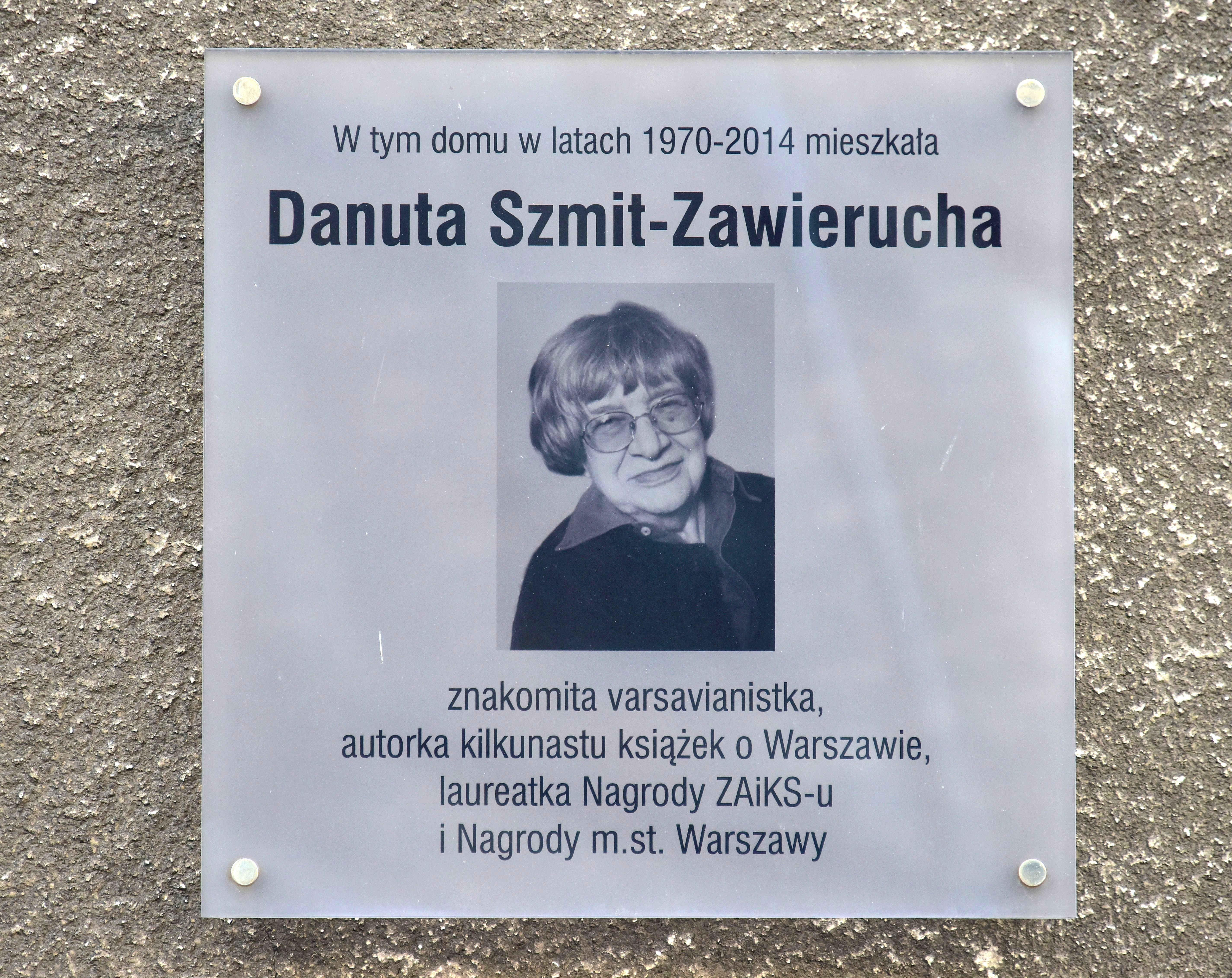 Tablica upamiętniająca Danutę Szmit-Zawieruchę przy ul. Brechta 9